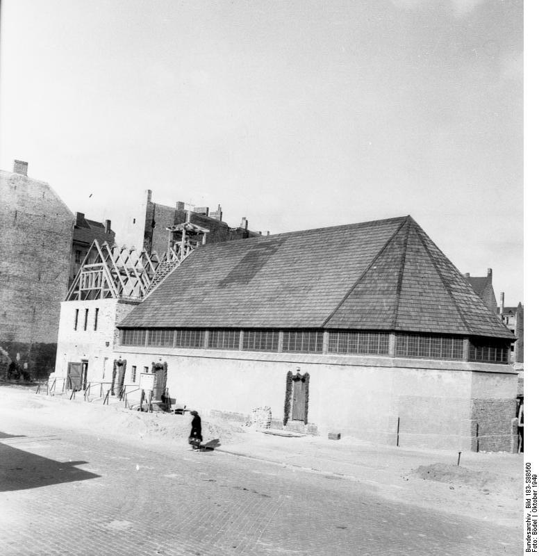 Berlin, Offenbarungskirche in Rummelsburg. Von Gemeindemitgliedern erbaute Notkirche. Aufn.: Illus/Bödel 6.10.49 4118-49